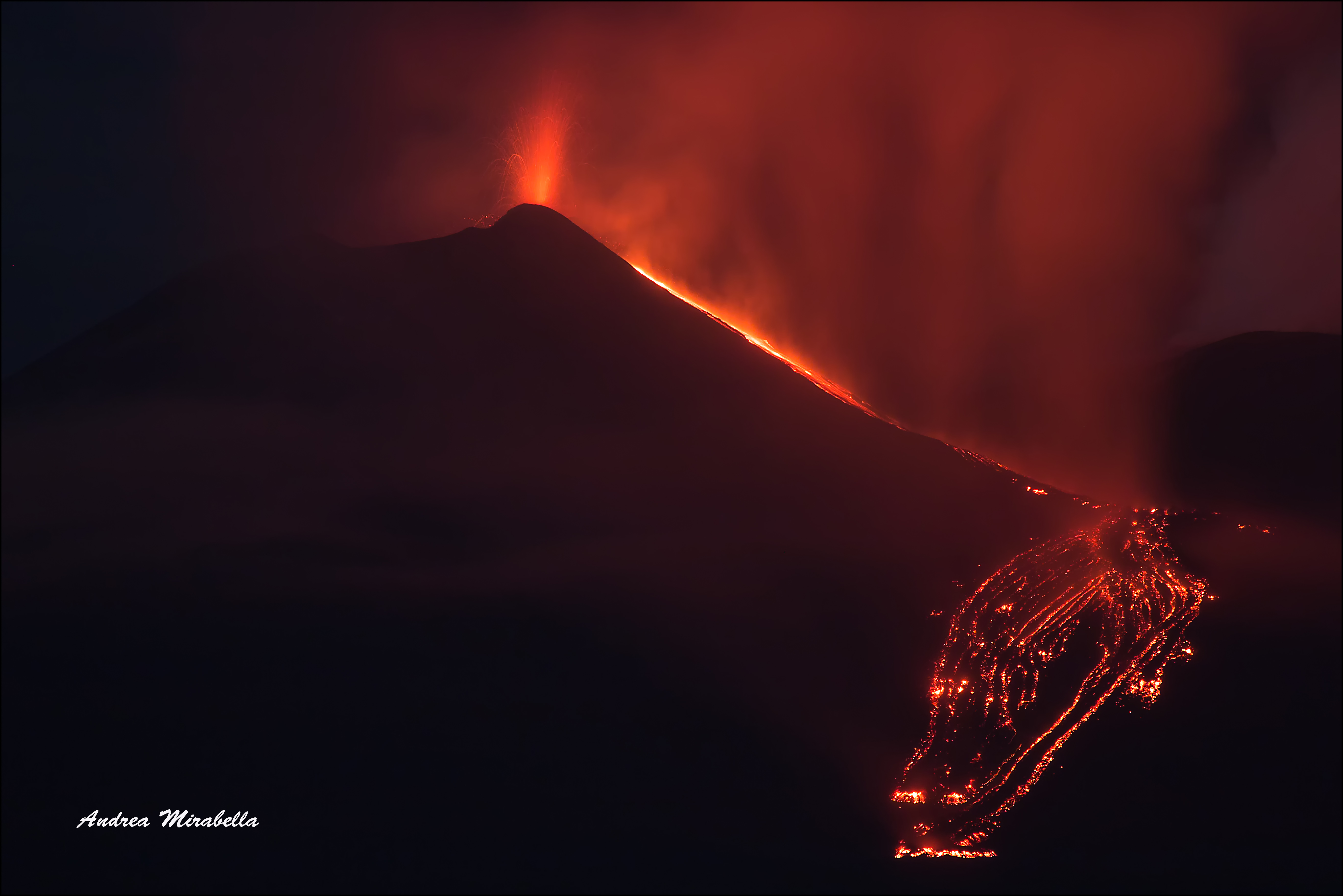 Colata lavica del 25 Agosto 2018